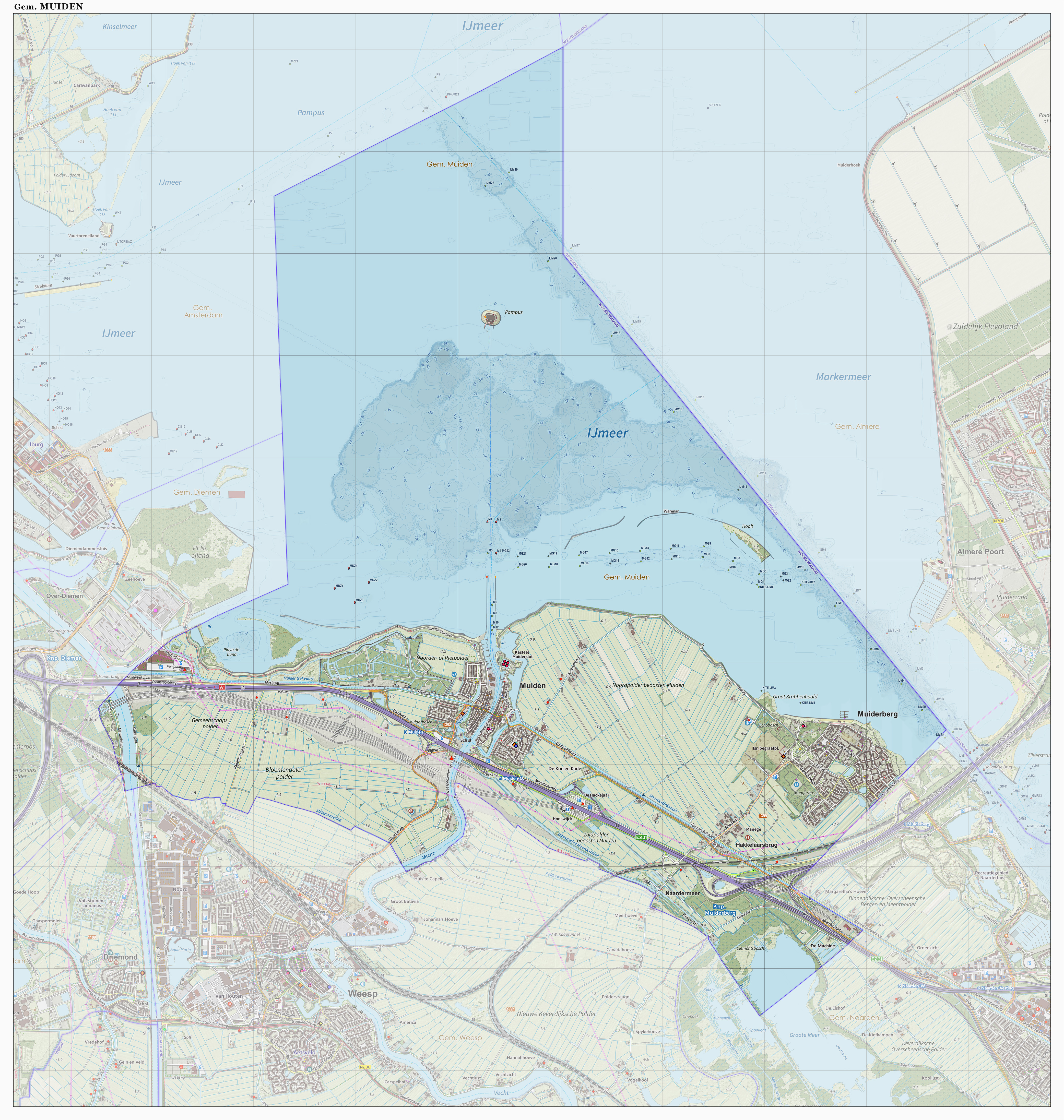 Topografische gemeentekaart. Resolutie: 400 pixels/km. Kaartbeeld samengesteld uit de open geodata van de Top10NL en Top25namen (Kadaster), Creative Commons-BY licentie. Gebouwvlakken uit open geodata BAG extract. Wegen uit de OpenStreetMap, OpenStreetMap community. Reliëfschaduw uit de Actuele Hoogtekaart AHN2. Samenstelling en kleurenschema: Jan-Willem van Aalst, met QGIS. Zie ook de Legenda.